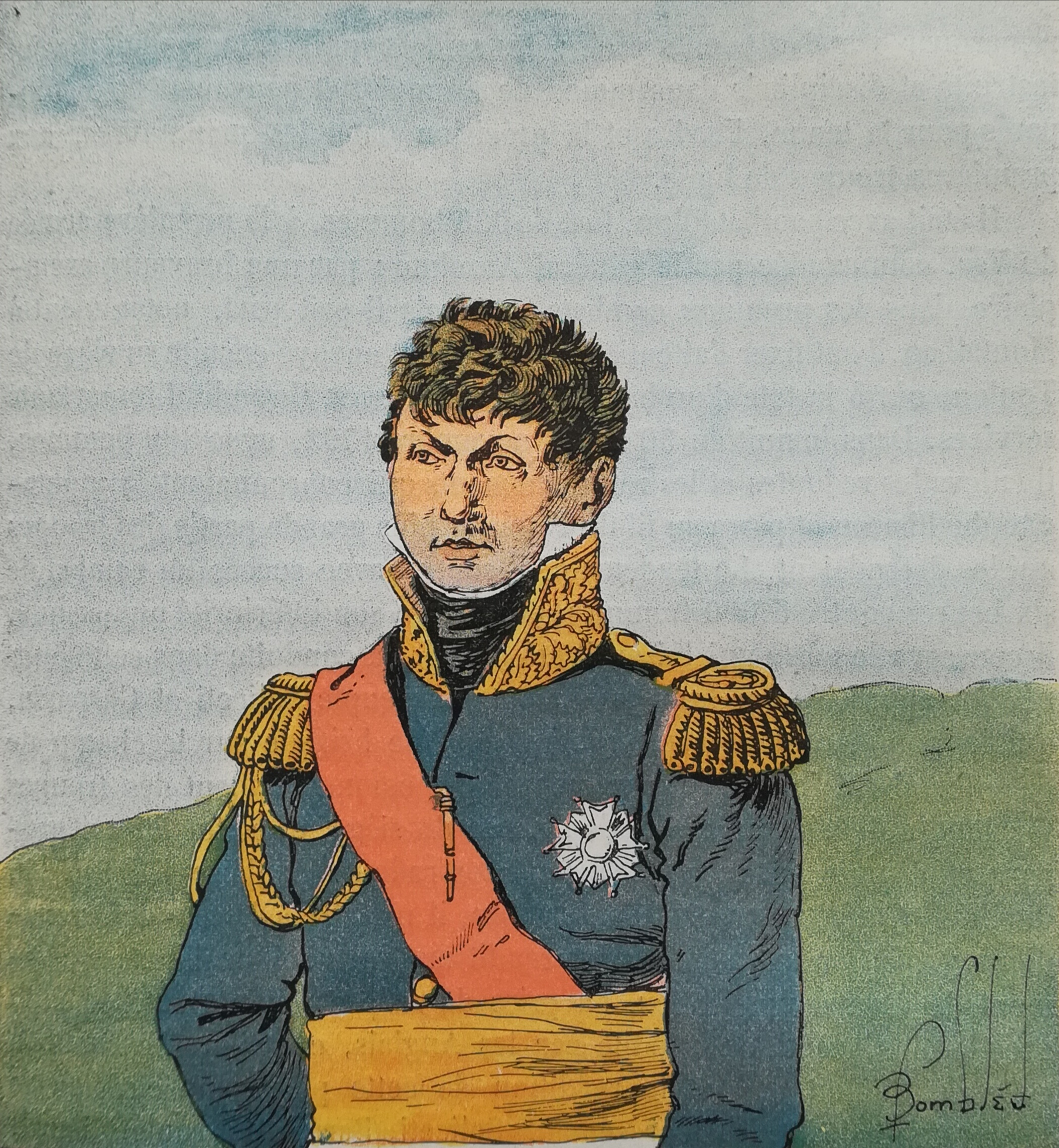 Le maréchal Claude-Victor Perrin, duc de Bellune.